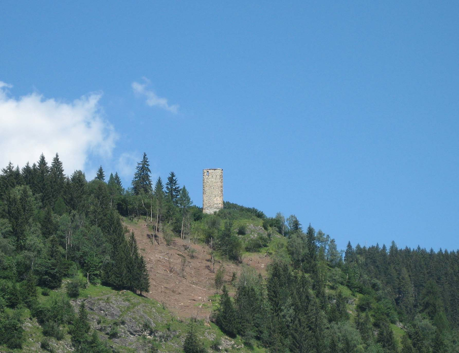 Lage